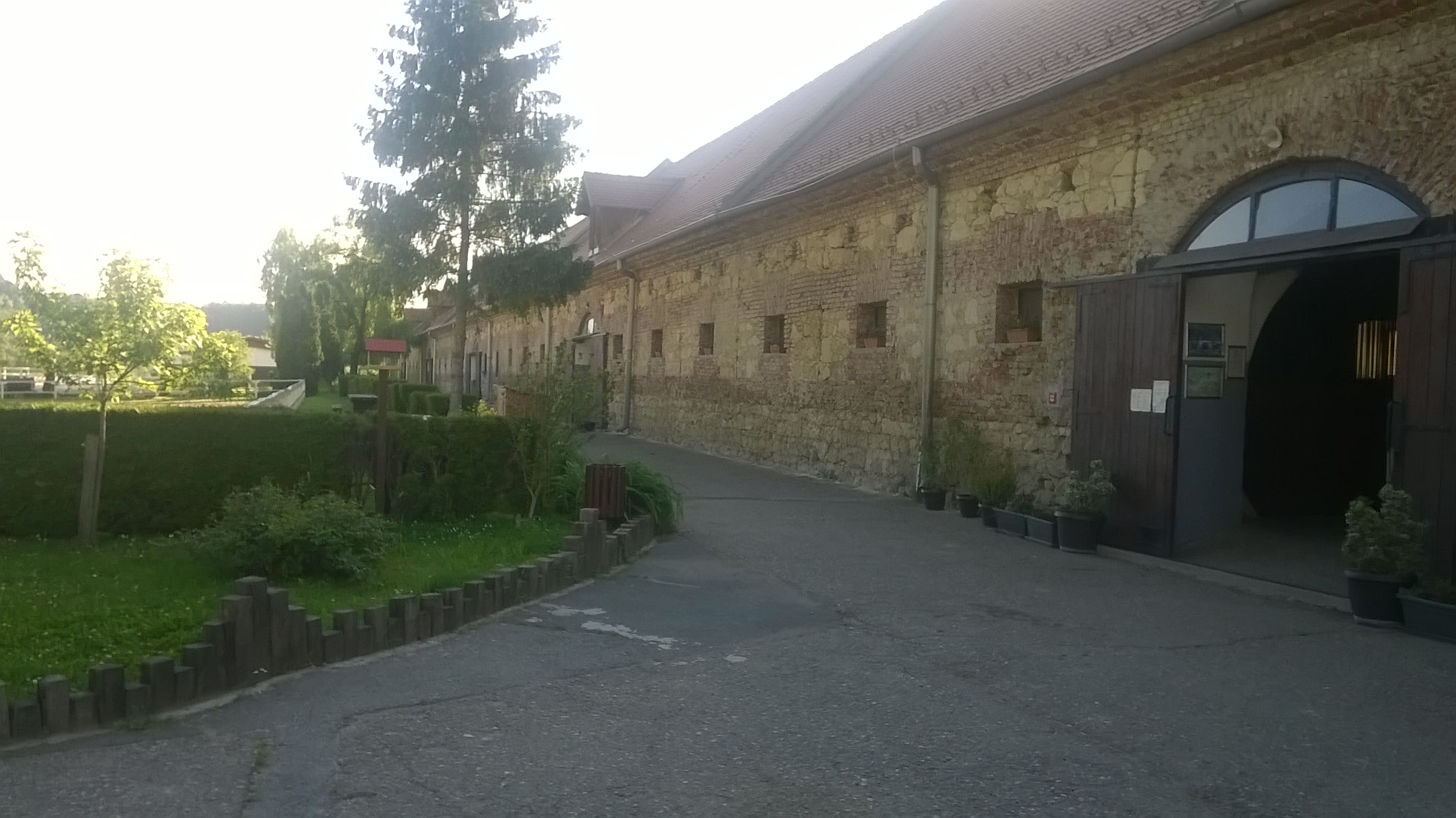 Lipizzaner Gestüt Lipik